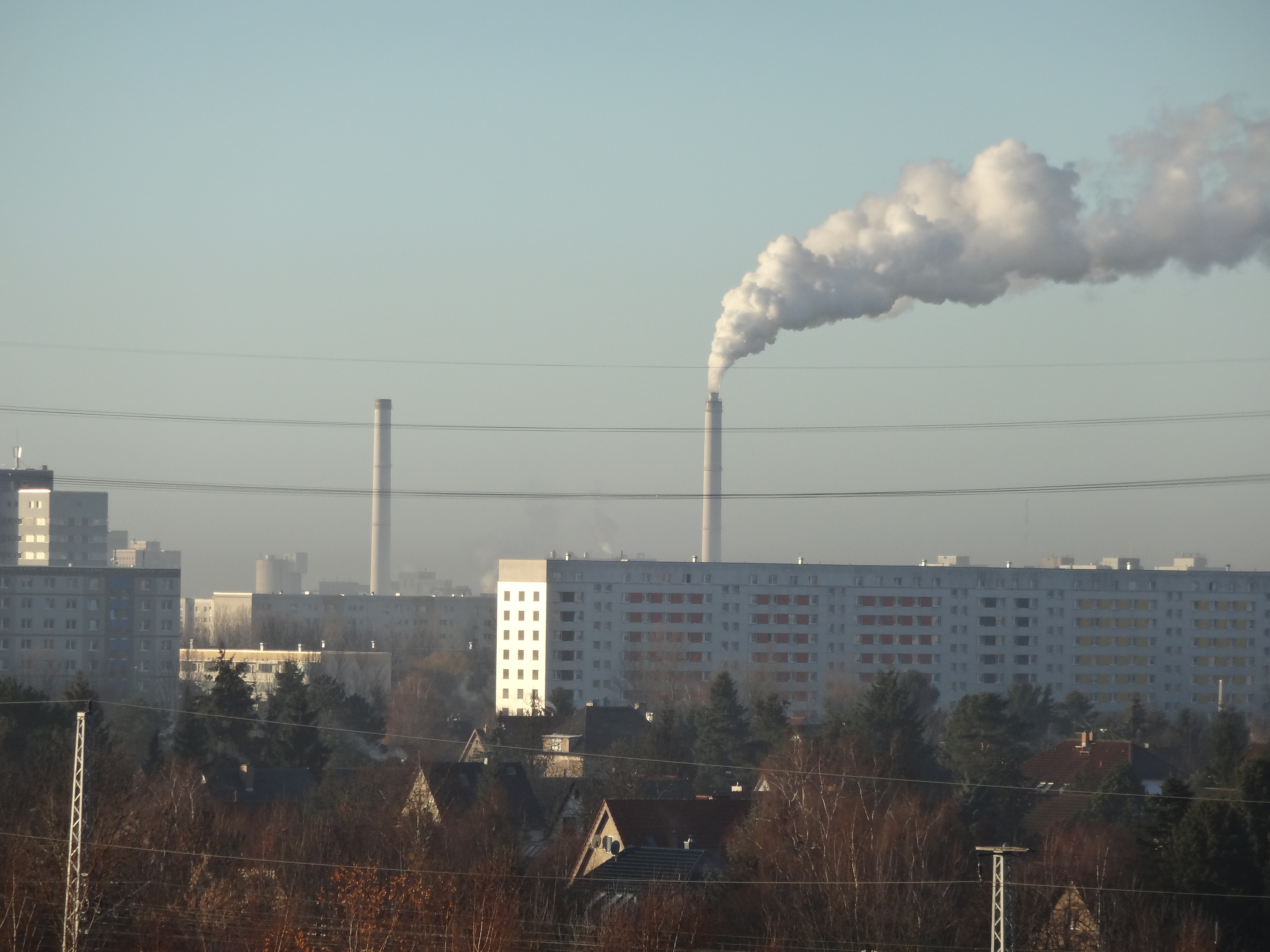 Kraftwerk Klingenberg, Ansicht von Berlin-Marzahn aus.